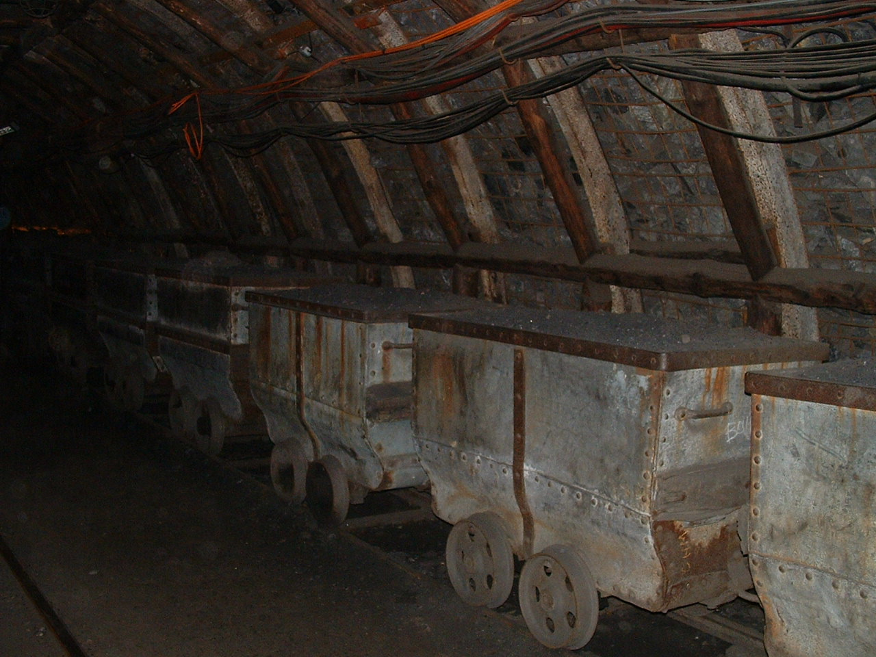 Centre historique minier de Lewarde wagonnets